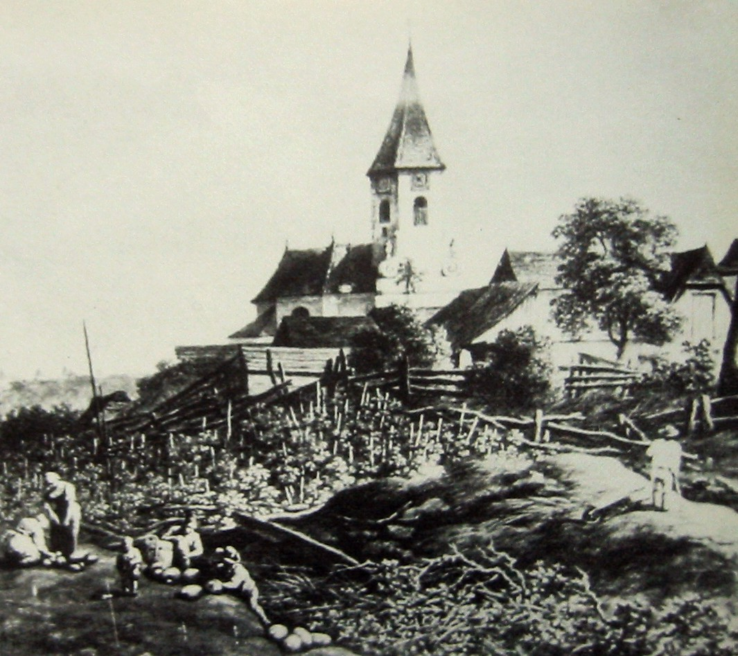 Altsimmeringer Pfarrkirche 1784